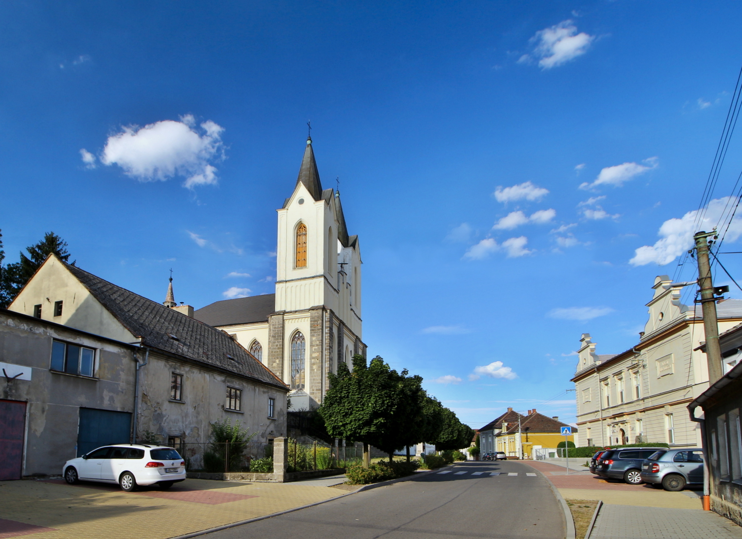 Řepín